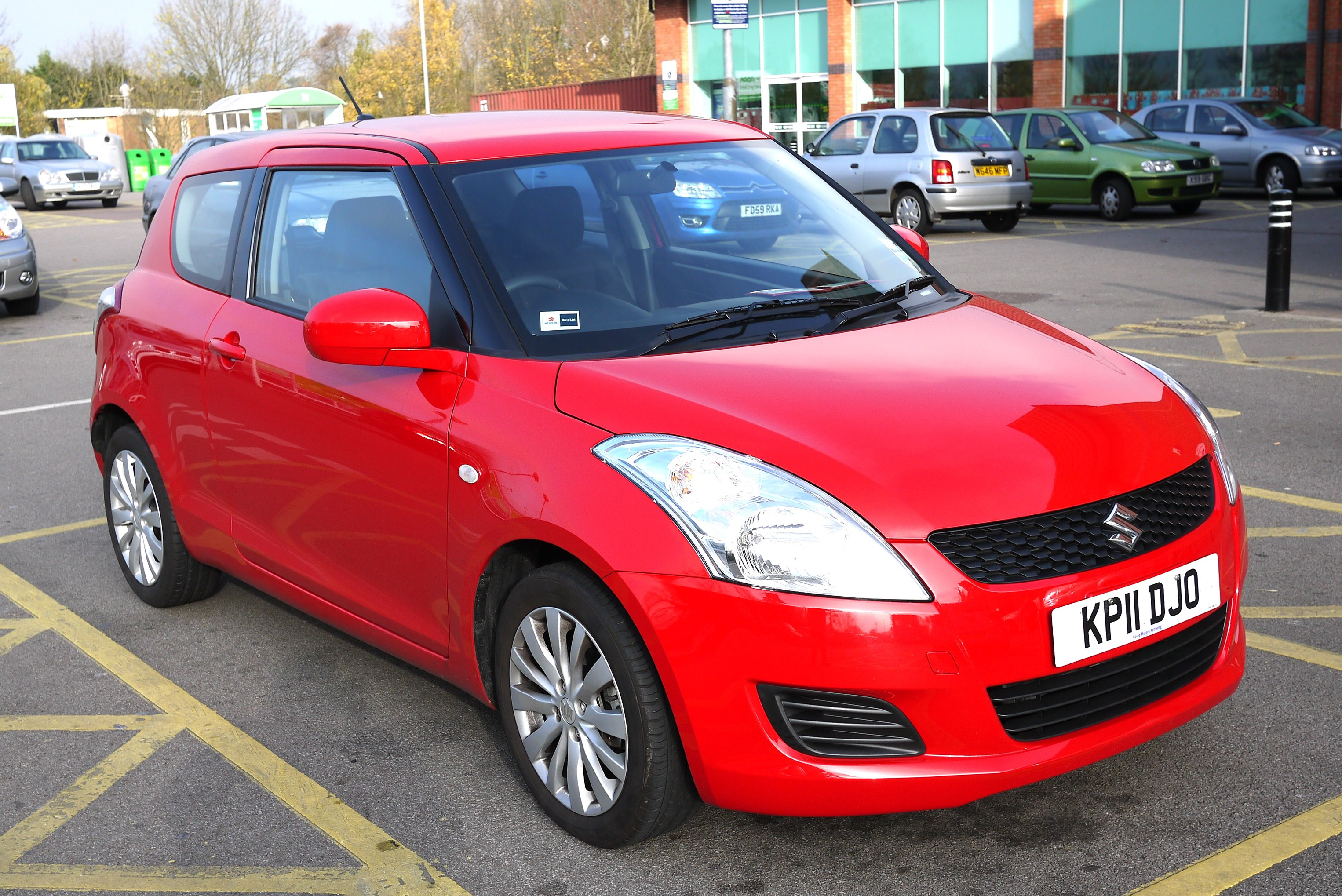 Panasonic GF3 20mm Pancake Lens